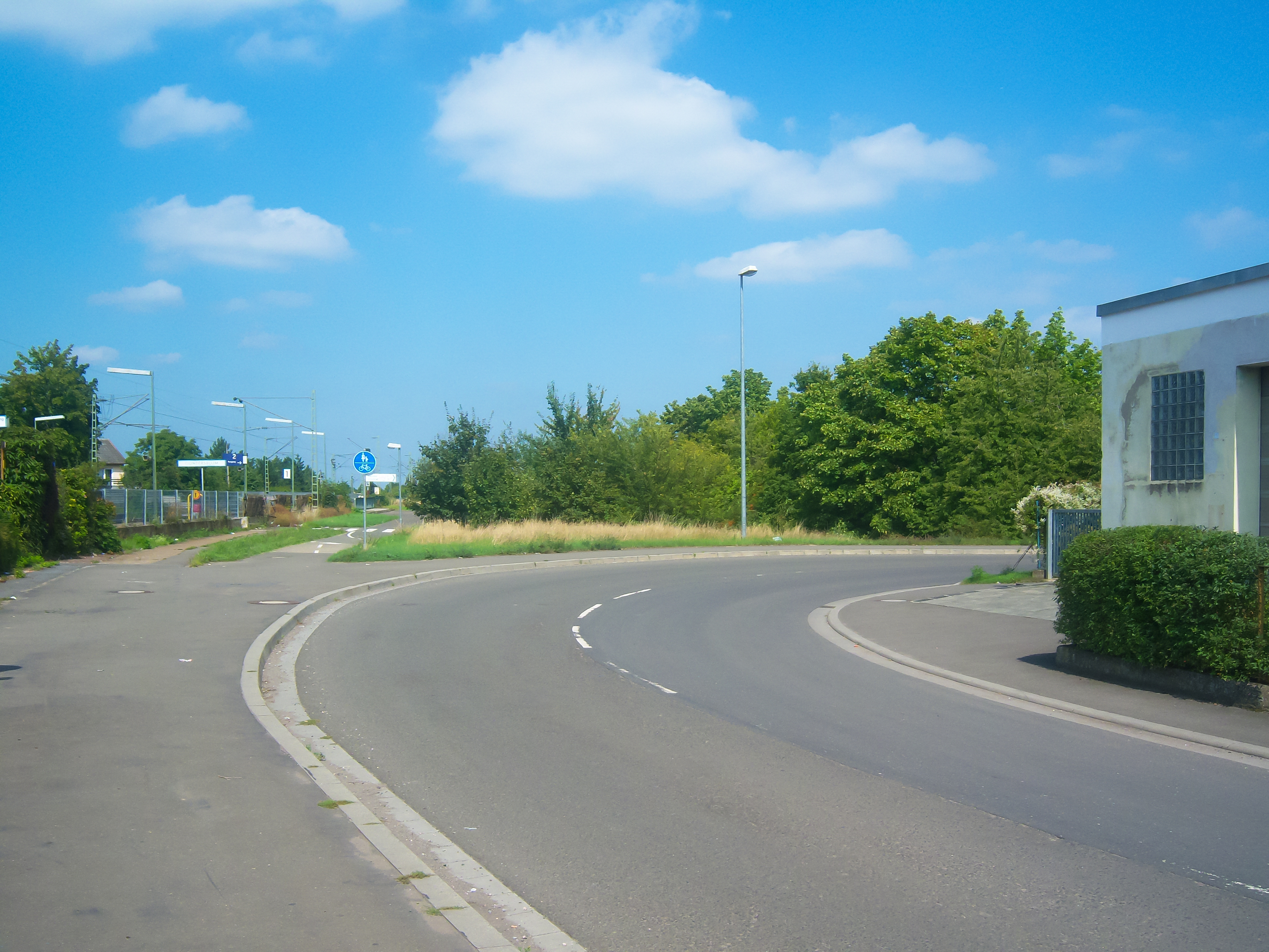 Die Wormser Straße in der Nähe des Guntersblumer Bahnhofs (Bahnsteig am Gleis Richtung Mainz) in Rheinhessen (Rheinland-Pfalz, Deutschland)